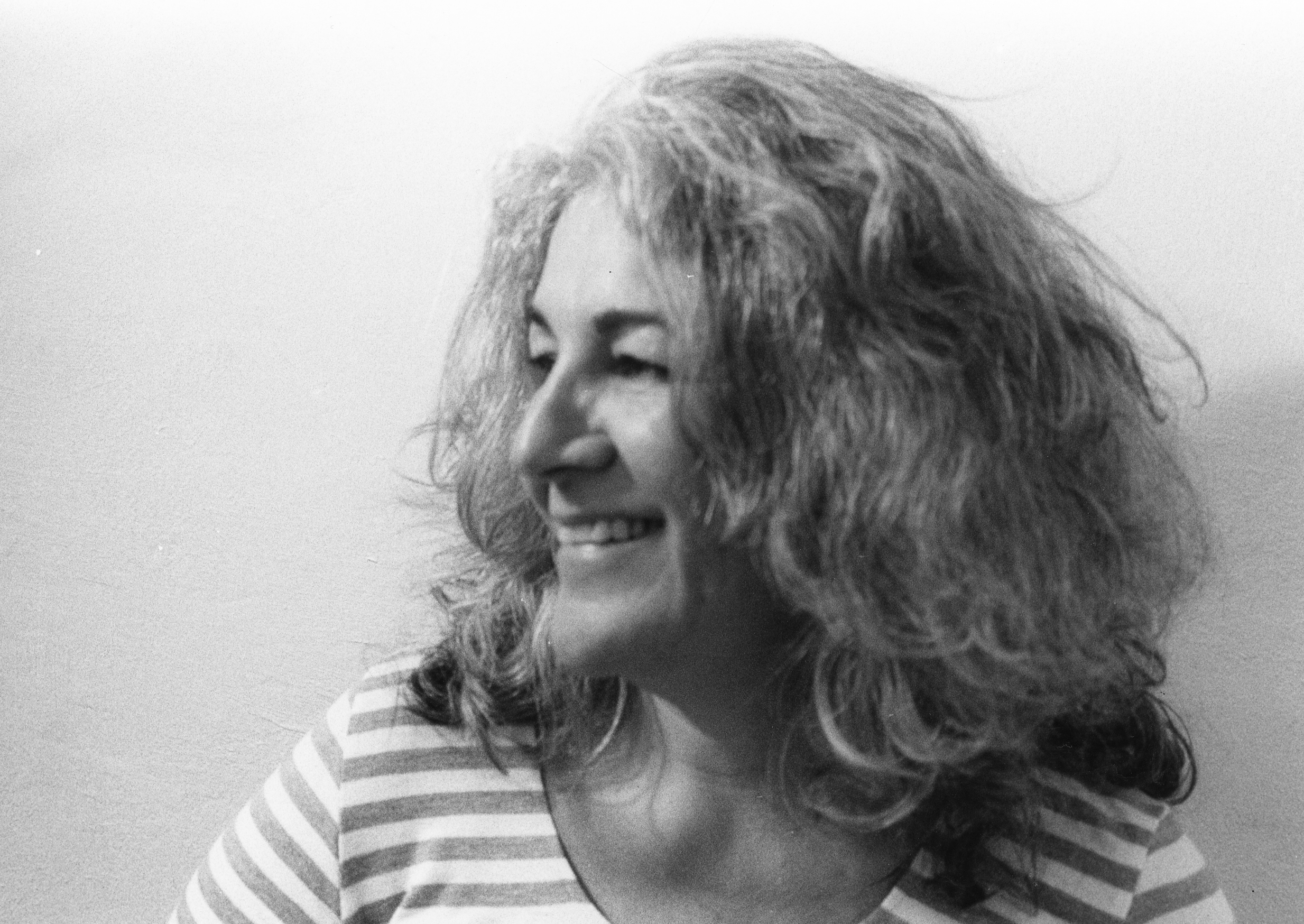 פרידה שהם